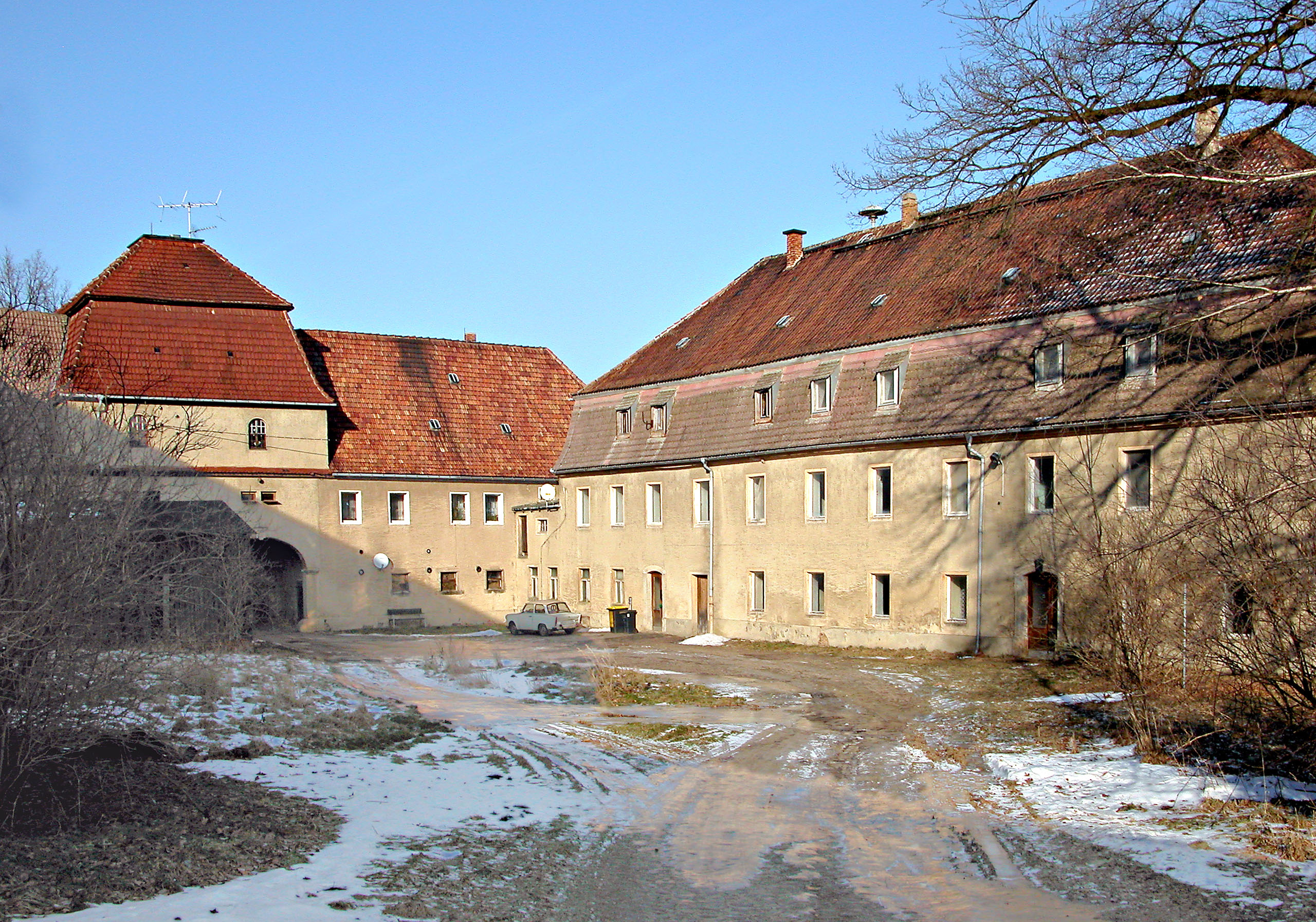 28.01.2006 01665 Deila (Käbschütztal): Rittergut. Blick von Osten in den Hof mit dem Torhaus (1776) und dem Herrenhaus (1793) von Johann Georg Wolf. [DSCN8594.TIF]20060128075DR.JPG(c)Blobelt